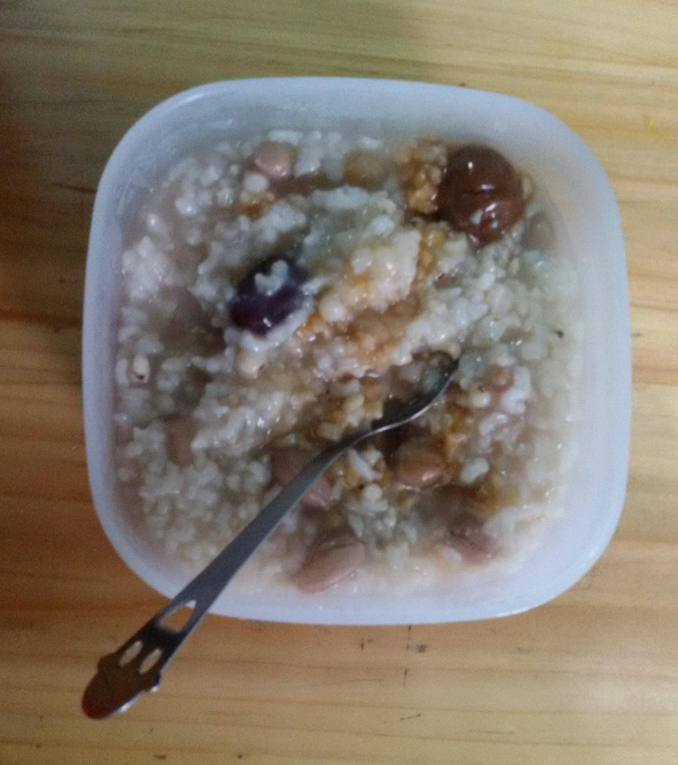 中文（中国大陆）: 简单制作的拗九粥，盛在塑料饭盒内。